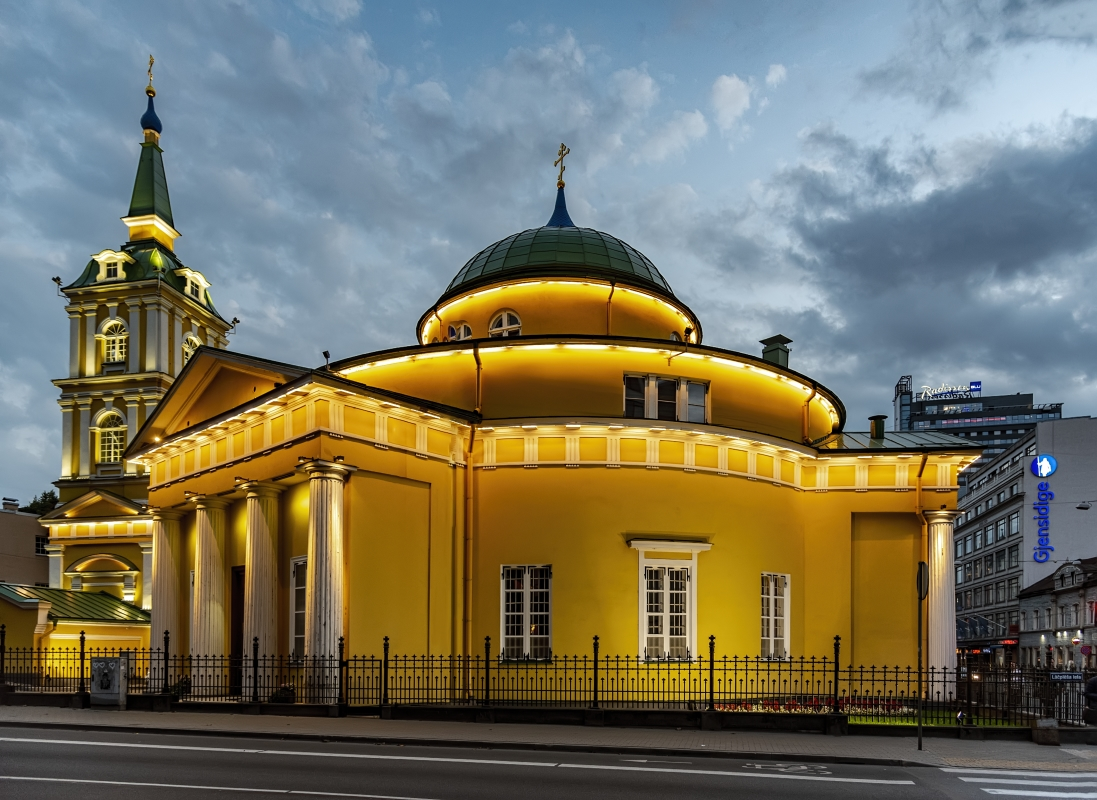 Rīgas Svētā Aleksandra Ņevska pareizticīgo baznīca, Centra rajons, Brīvības iela 56